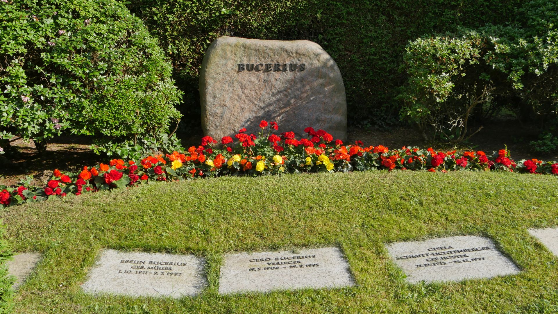 Grabstätte Bucerius auf dem Reinbeker Friedhof